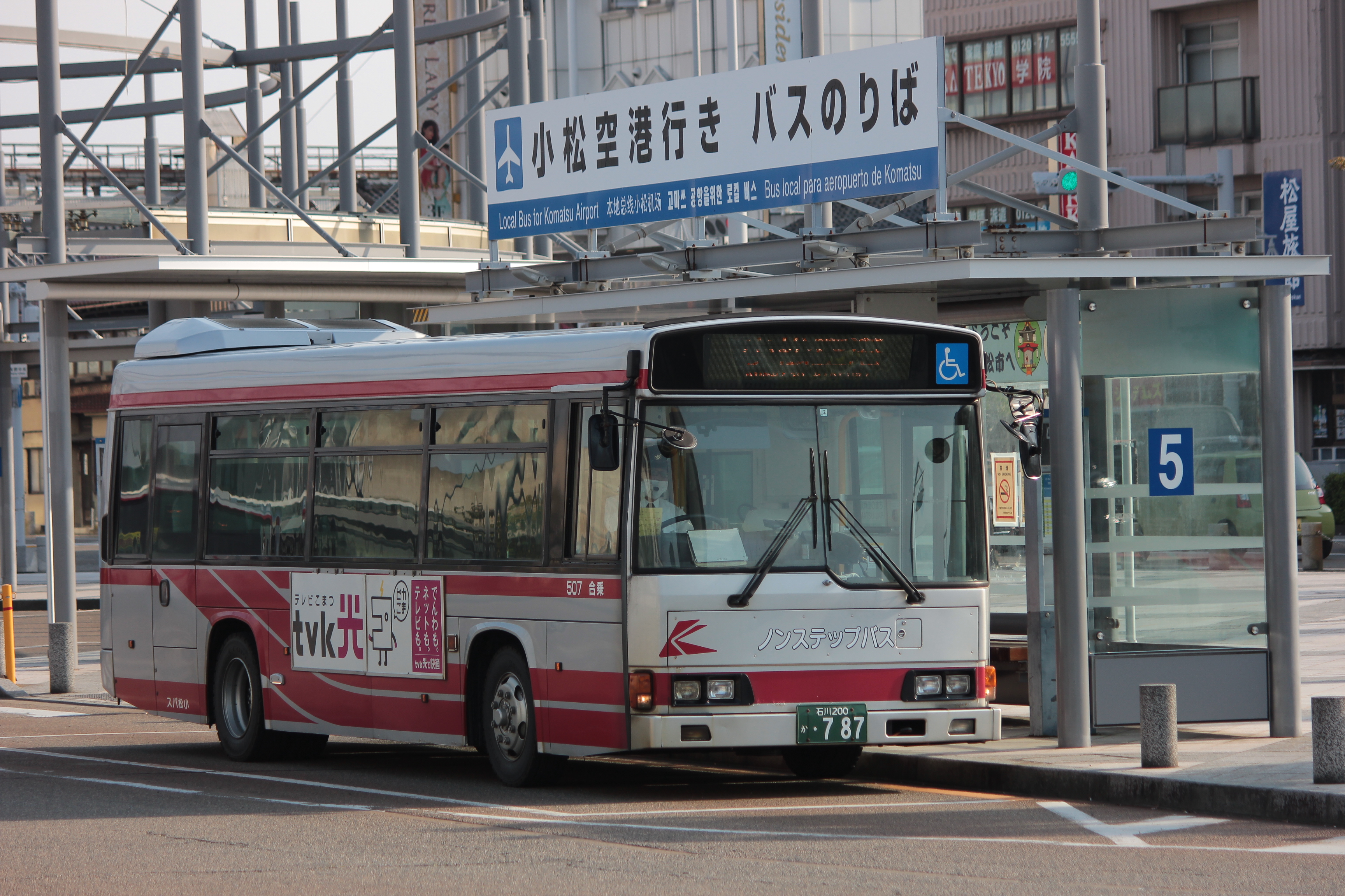 小松駅西口にある小松バスの小松空港行き乗り場。 Canon EOS Kiss X5